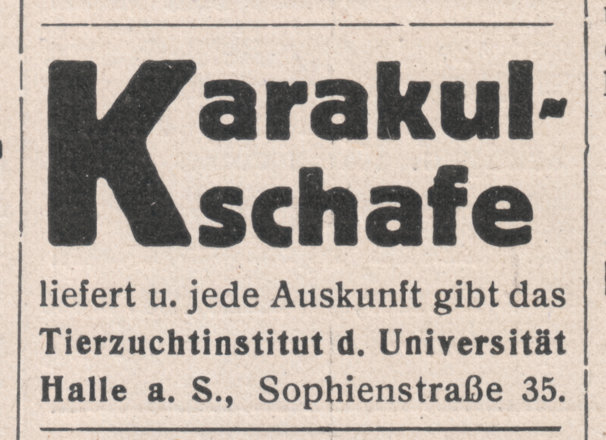 Karakulschafe liefert u. jede Auskunft gibt das Tierzuchtinstitut d. Universität Halle a. S., Sophienstrasse 35. Anzeige in „Der Deutsche Pelztierzüchter“, Jg. 1930, Heft 10, München 1. Oktober. Verlag F. C. Mayer GmbH, München C2, Seite XIV